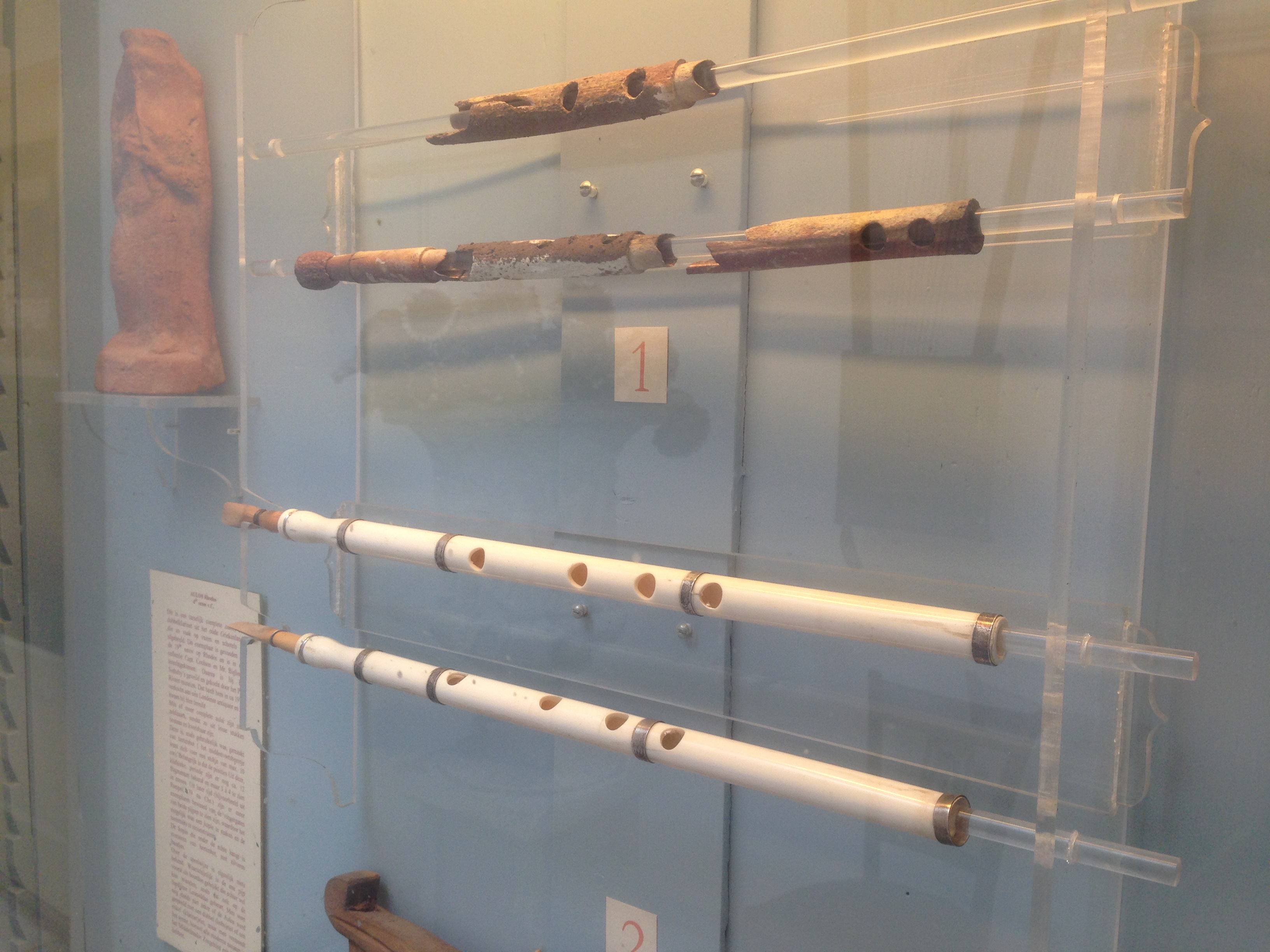 Museum Vosbergen, Eelde, Netherlands, Aulos / double schalmei, ca. 500 BC, Greece